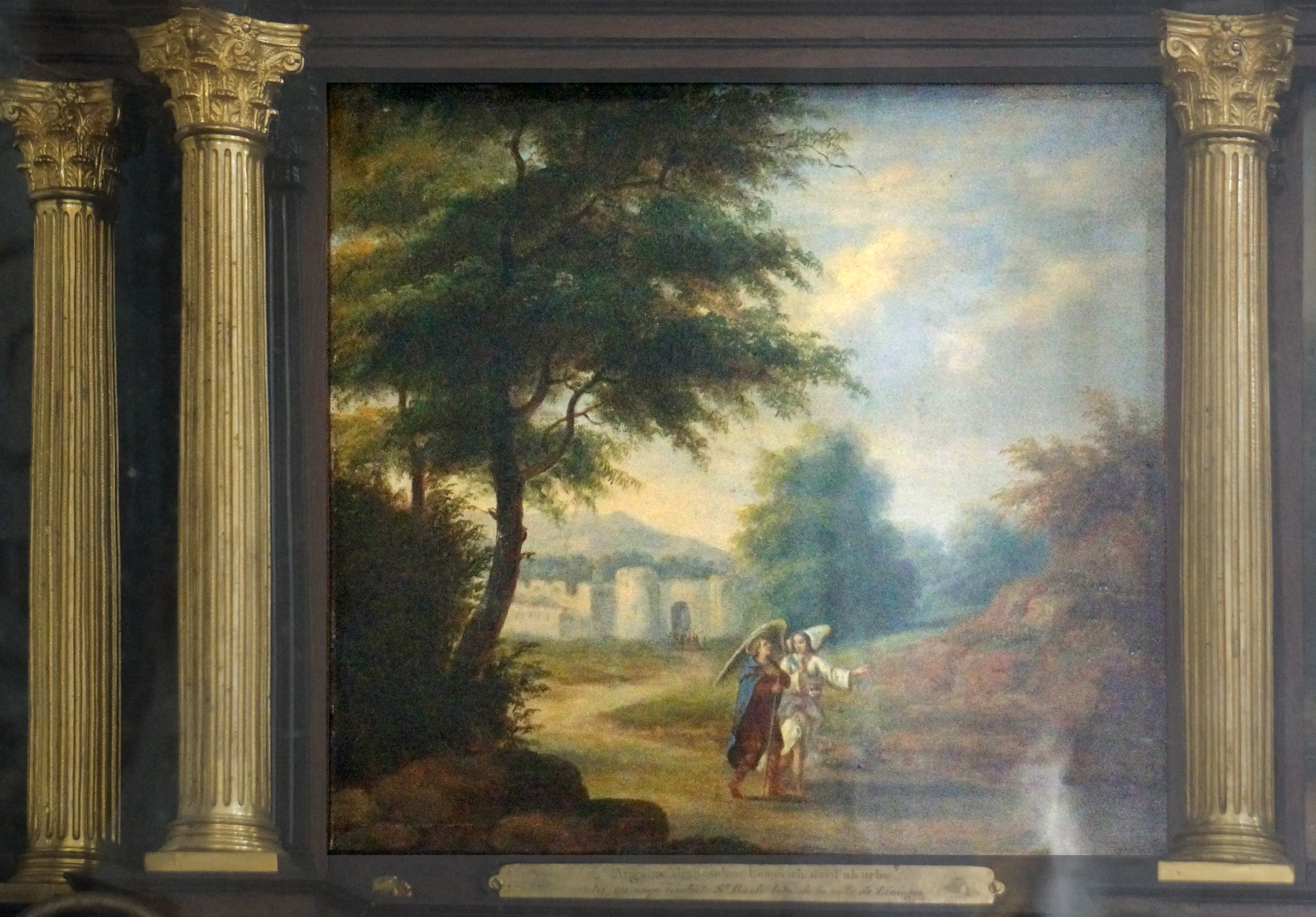 Peinture de la chasse de Basolus.